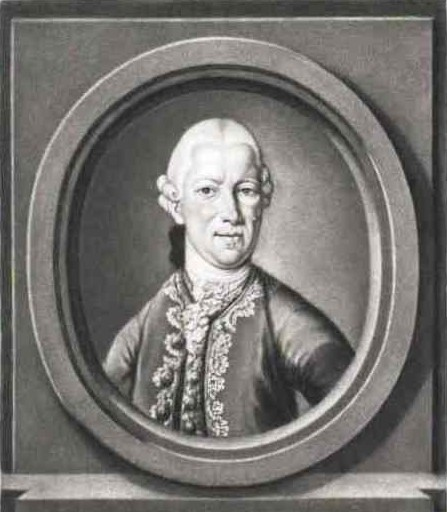 Johann Ernst Immanuel Walch (1725–1778)